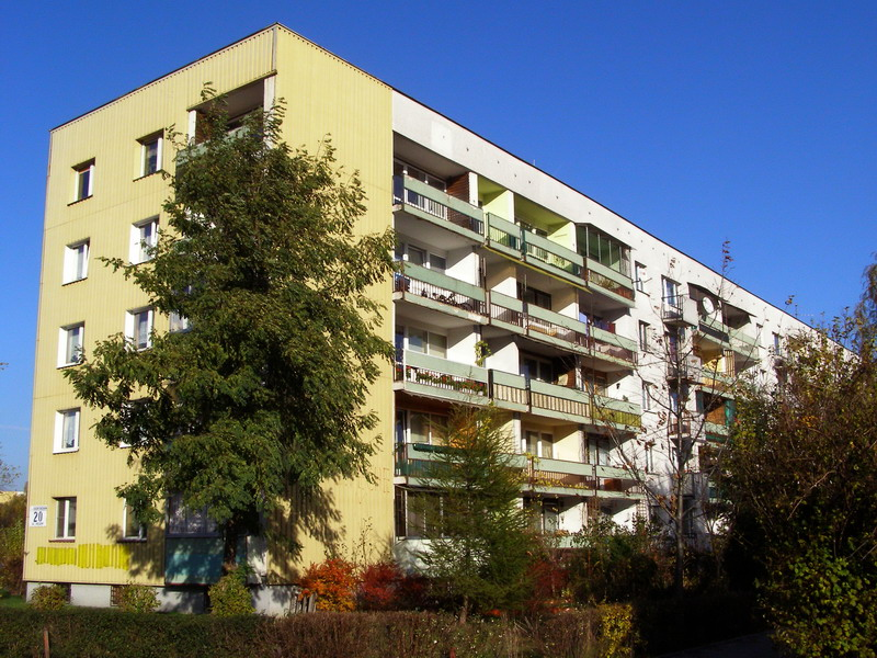 Blok przy ul. Heleny na osiedlu Nowy Bieżanów w Krakowie.